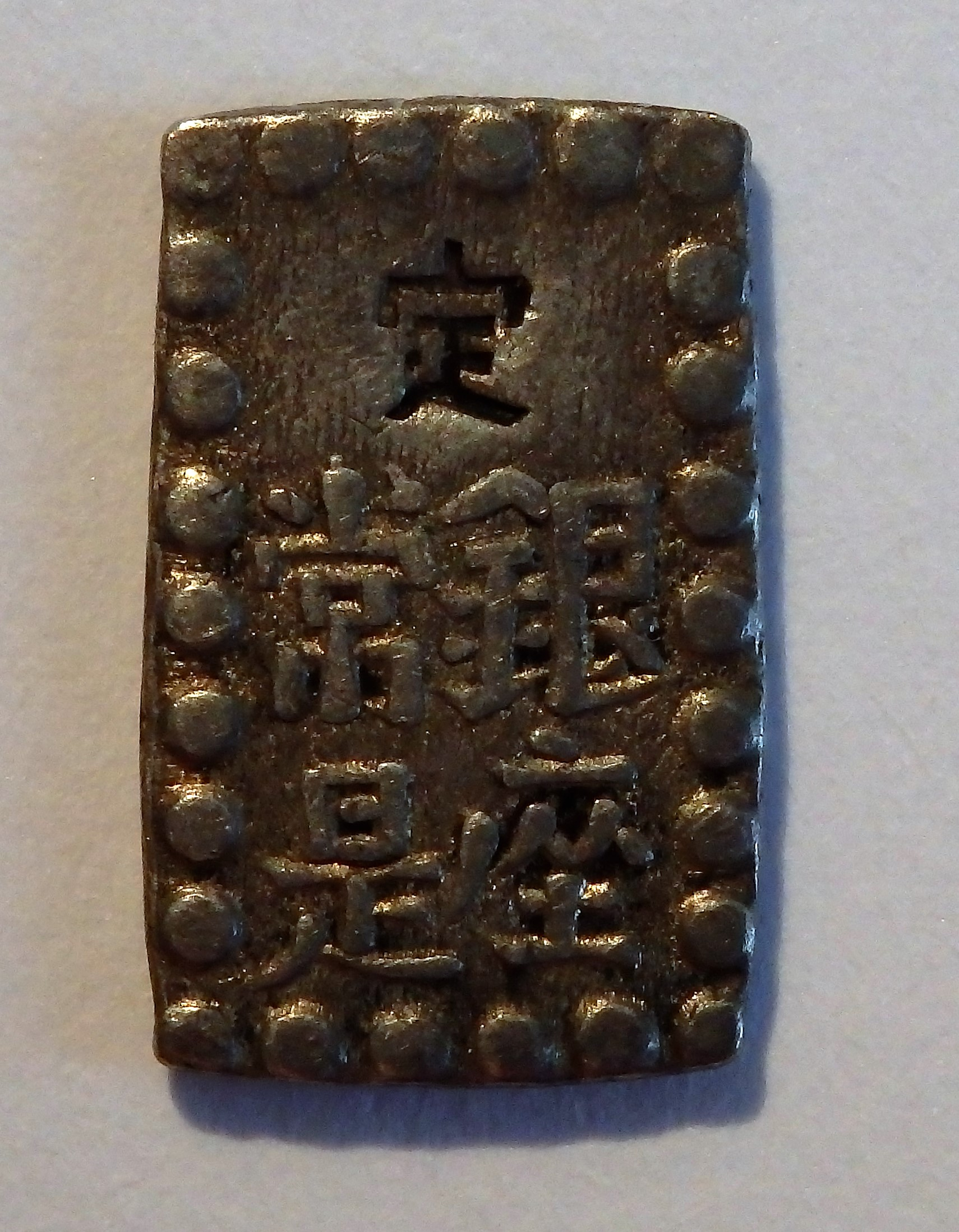 1 Shu (Japan), zwischen 1853 und 1865 geprägt, oberes Schriftzeichen gepunzt